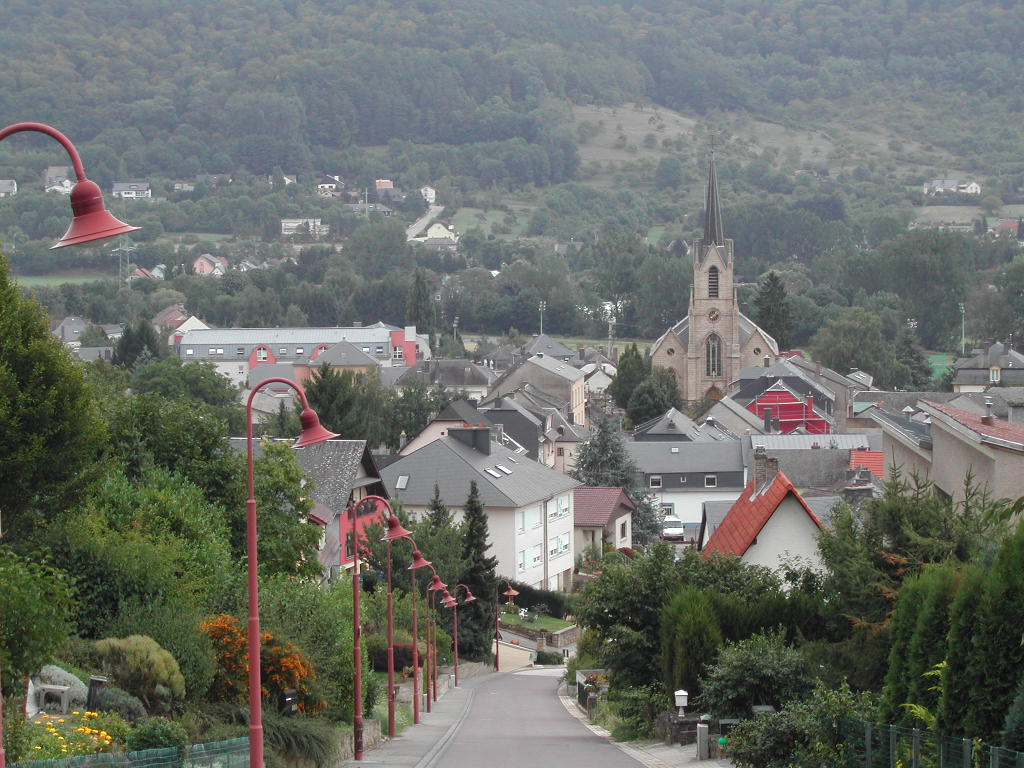 Steinsel view